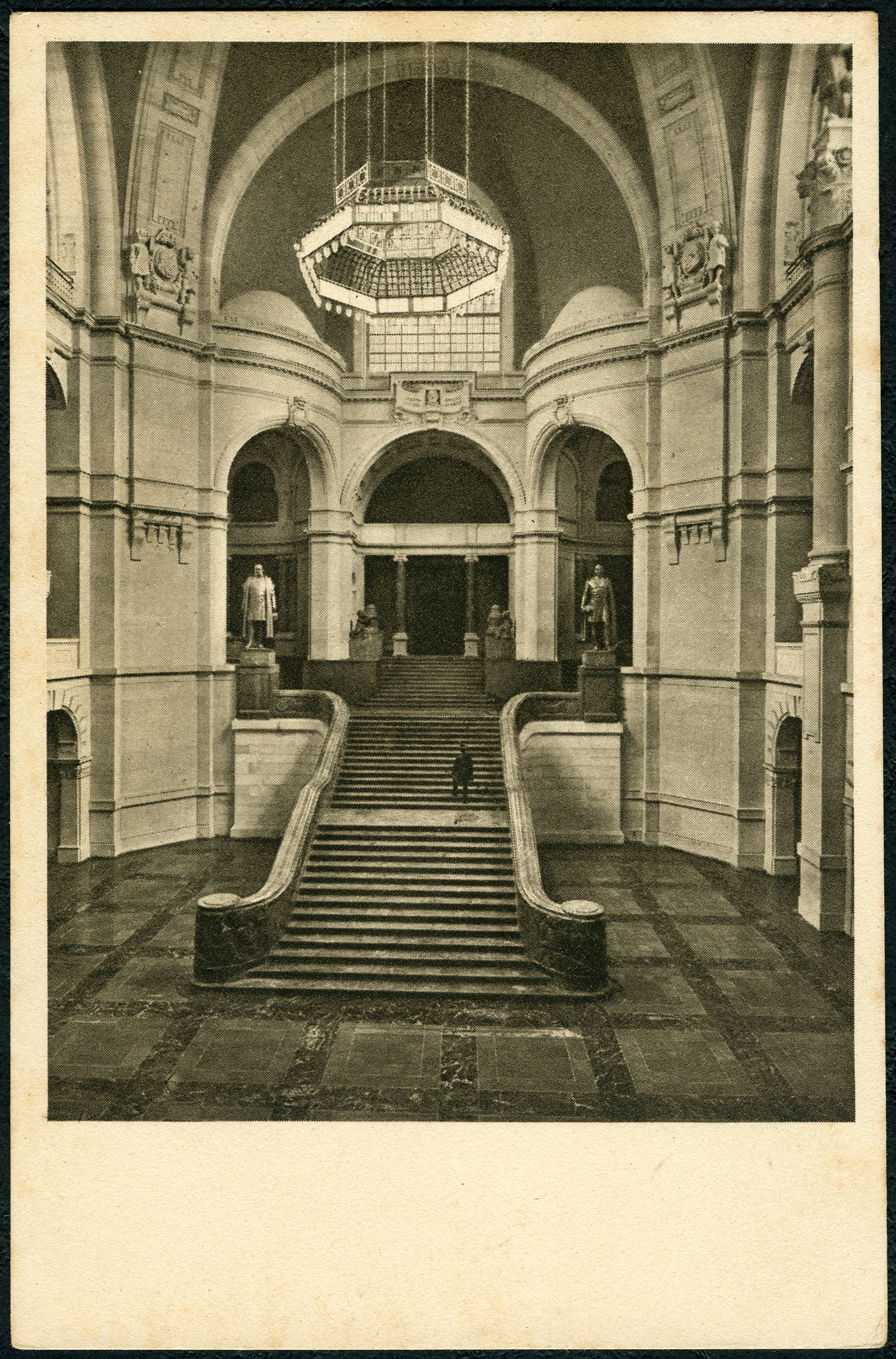 Bildseite von Friedrich Astholz juniors Ansichtskarte Nummer 7 aus dem Inneren des 1913 eingeweihten Neuen Rathauses von Hannover mit der - umseitig - vorgedruckten Bildbeschreibung: „Hannover, Neues Rathaus. / Zentralhalle von Architekt Geh. Oberbaurat Eggert. / Festtreppe und Beleuchtungskrone von Prof. G. Halmhuber. Zwei Kaiserstandbilder von Prof. Adolf Brütt.“ Die Kaiserstandbilder - eingeschmolzen zur Zeit des Zweiten Weltkrieges - waren Denkmäler der deutschen Kaiser Wilhelm I. und Wilhelm II. ...